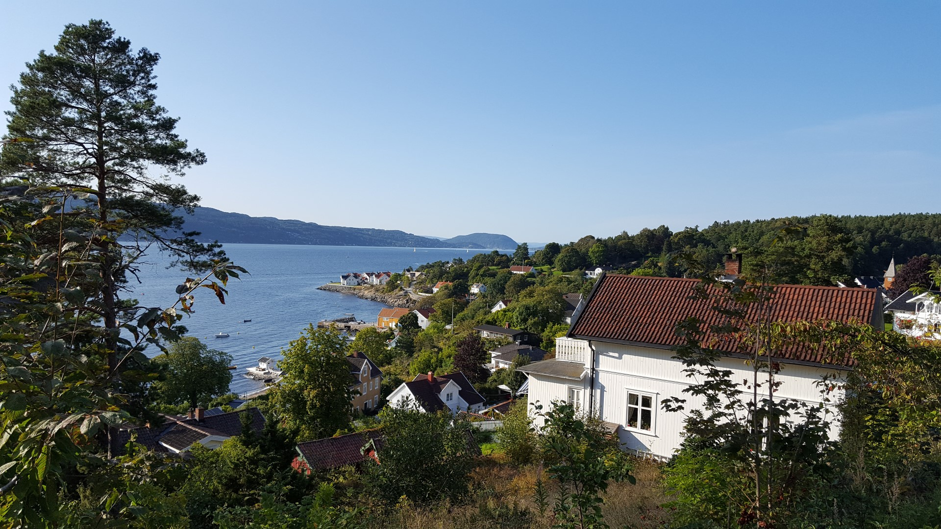 Utsikt over Hvitsten